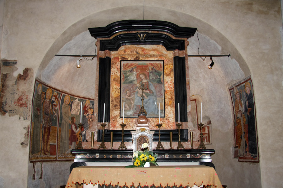 Interno dell'Oratorio di Santa Maria, Garbagna Novarese (NO): Altare ed affreschi dell'abside.